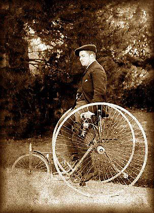 Mon grand-père Antoine Bouchard sur son tricycle Salvo-Royal en 1887 dans le parc du château de Maizières (Saint-Loup de la Salle - Saône et loire)